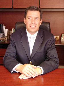 Miguel Márquez Márquez